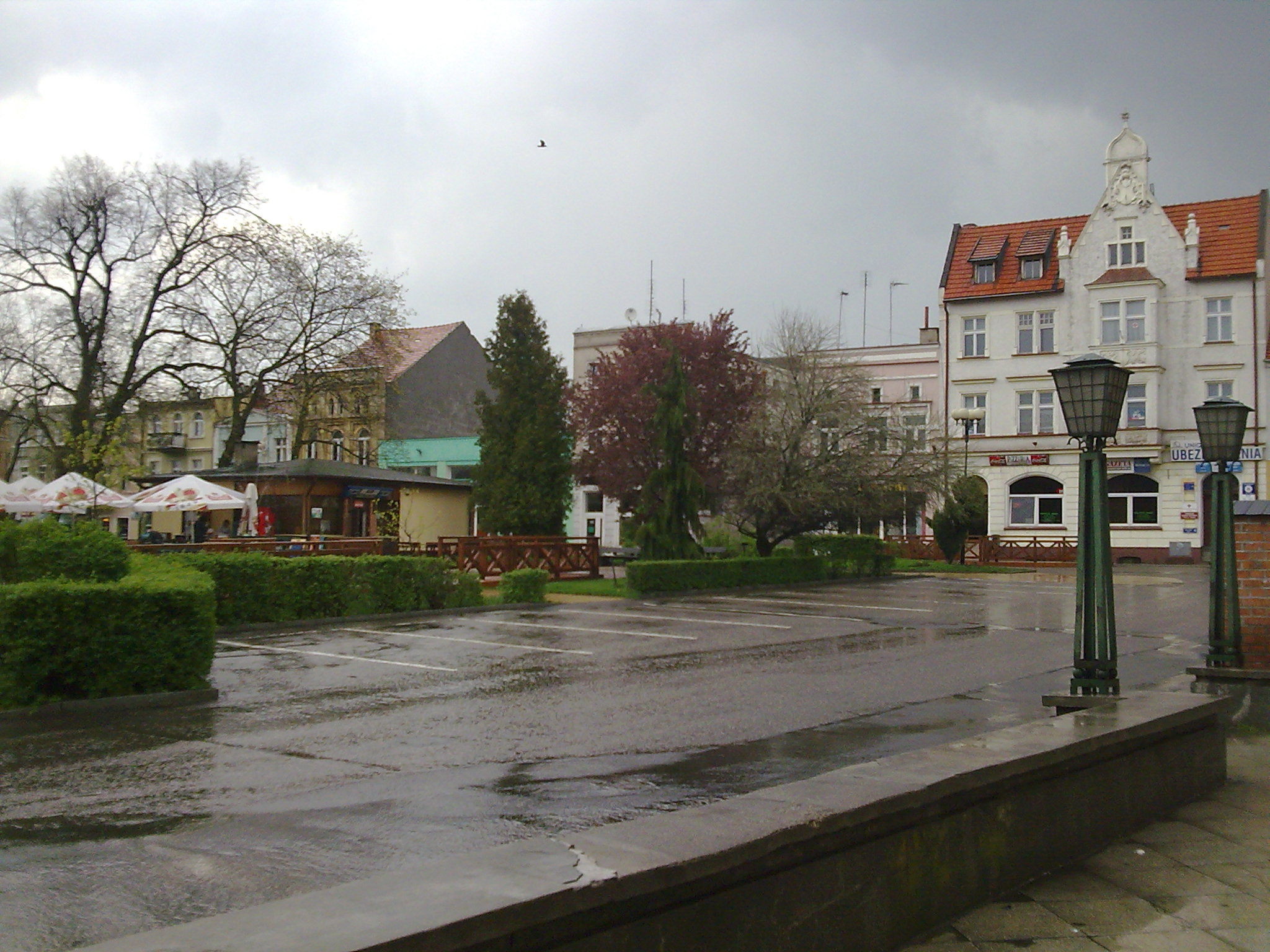 Plac Wolności w Tucholi